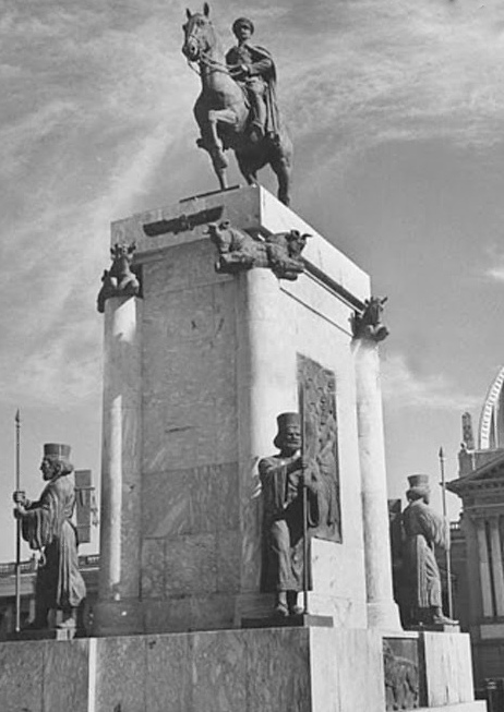 تندیس رضاشاه در میدان توپخانه (میدان سپه) در سالهای دهه